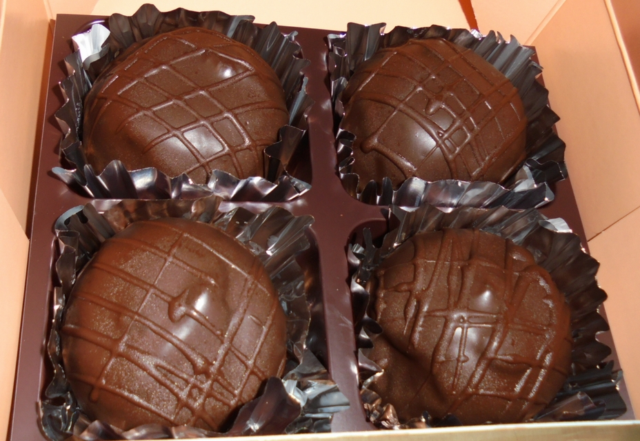 Rum_ball (KIKU-YA, Japan)